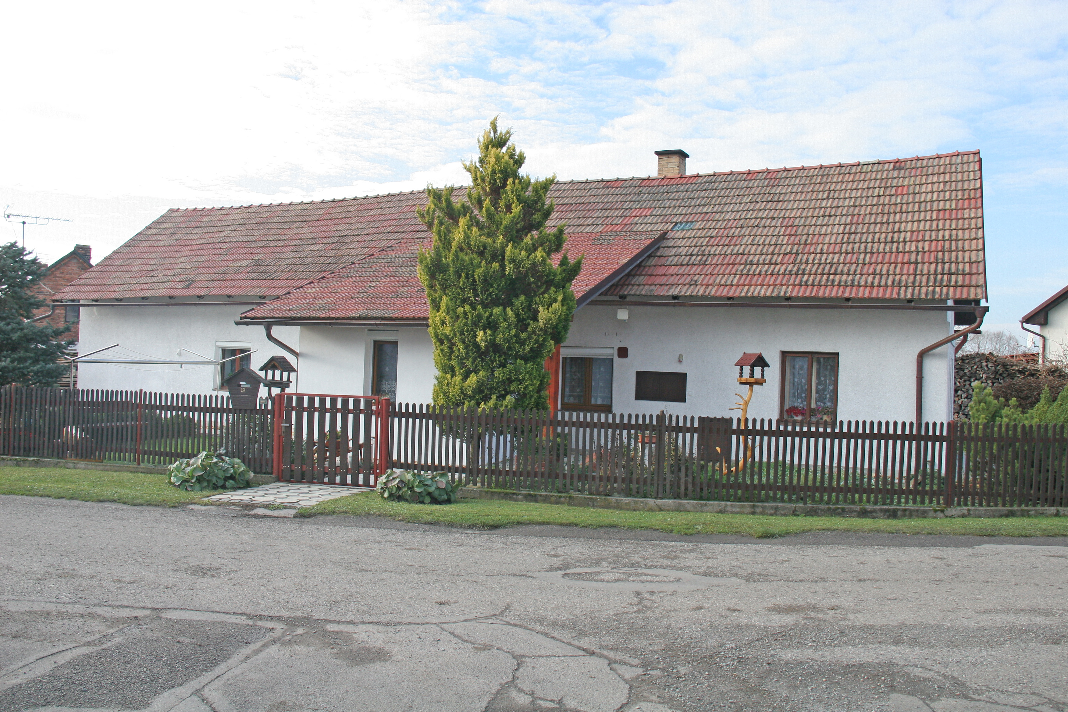 Lipiny čp. 13